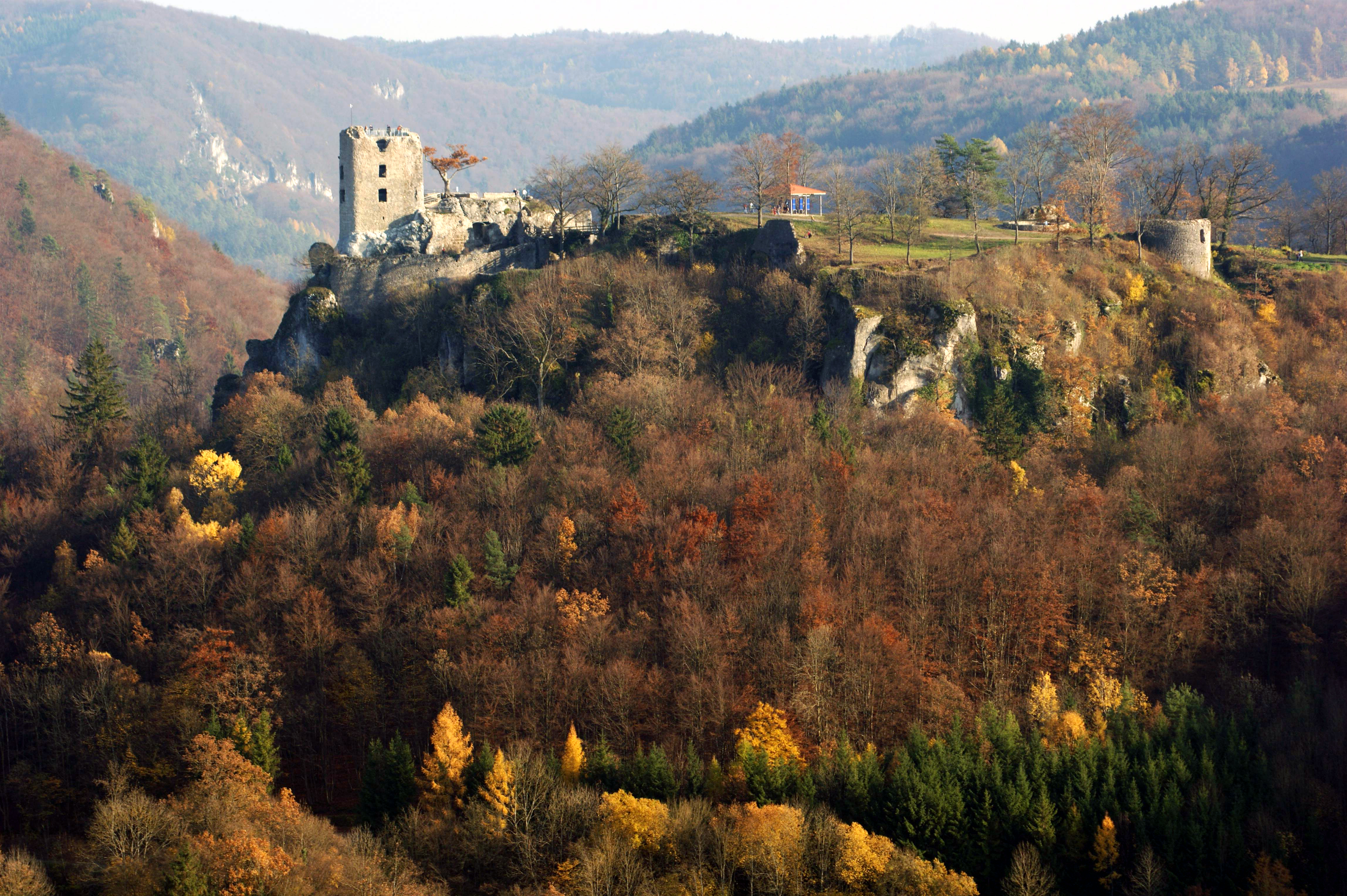 Burgruine Neideck